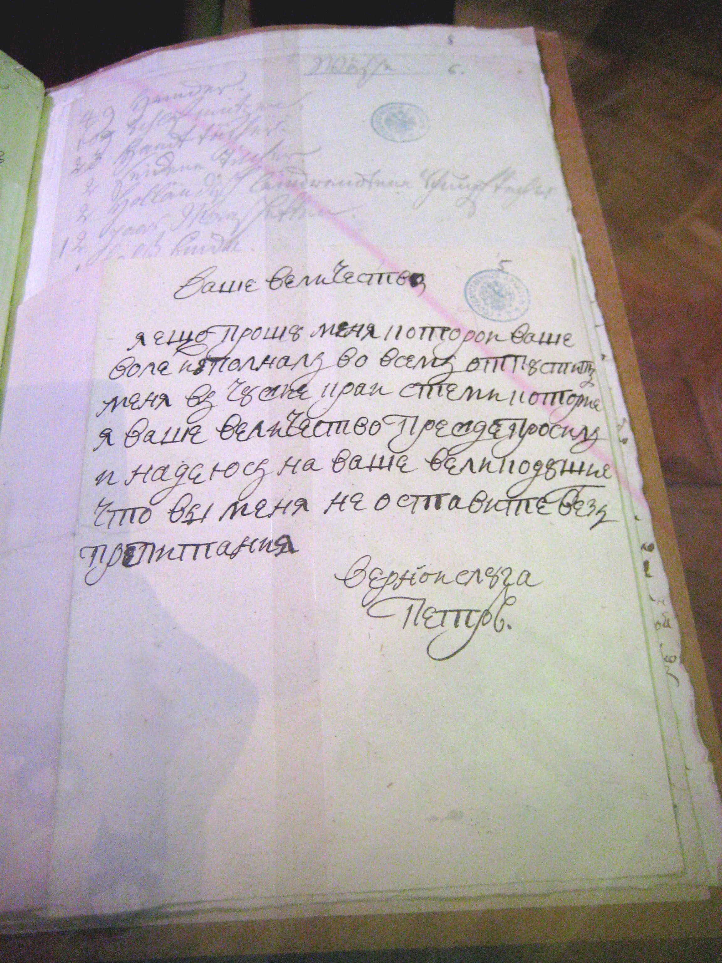 Письмо Петра III из Ропши Екатерине II с просьбой отпустить его в "чужие края". После 28 июня 1762. Автограф. РГАДА. "Ваше величество, я ещо прошу меня, которой ваше воле исполнал во всем, отпустить меня в чужие краи, с теми, которие я, Ваше величество, прежде просил, и надеюсь на ваше великодушие, что вы меня не оставите без пропитания. Верной слуга, Петр".